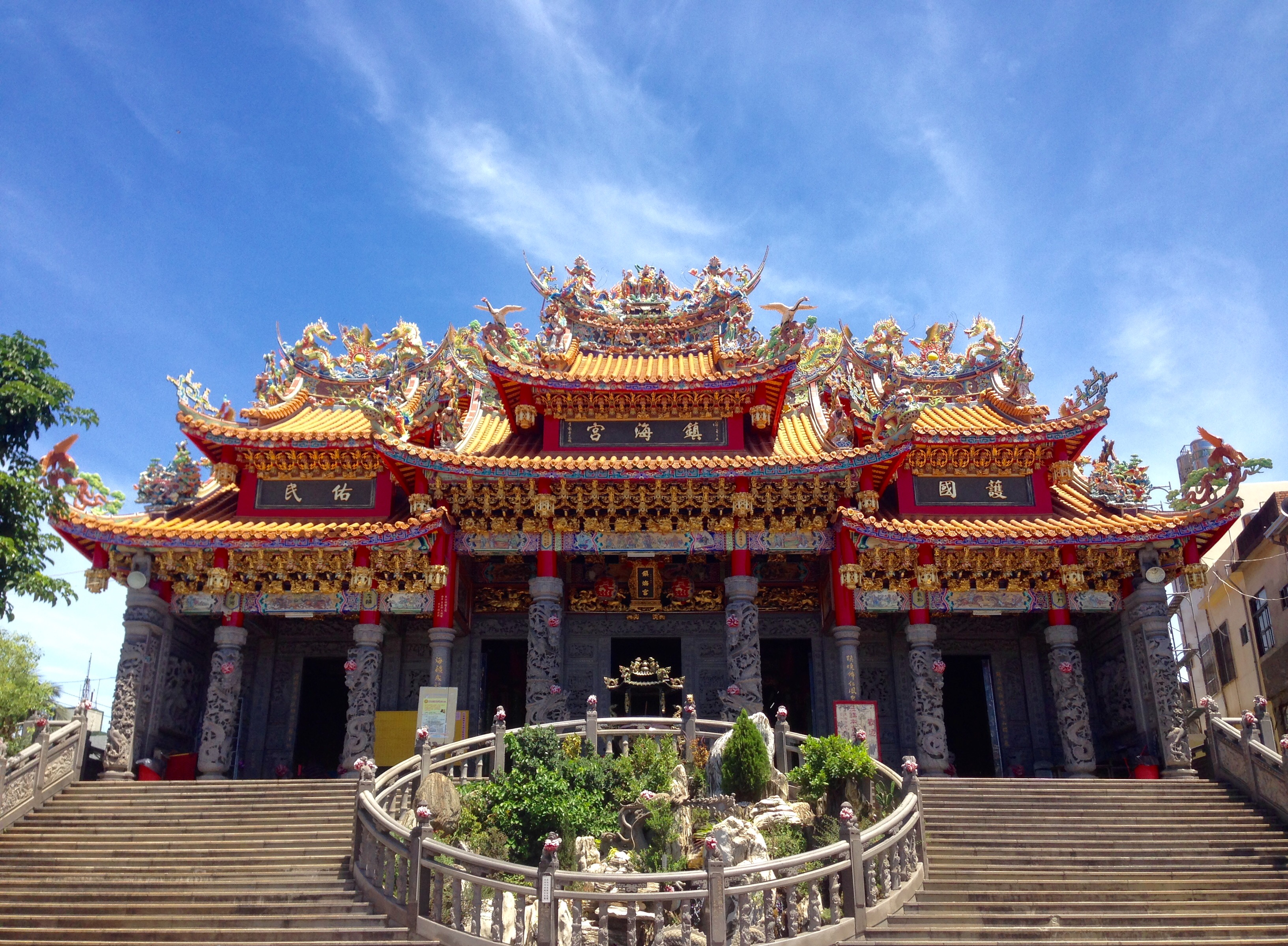 中文（台灣）: 東港鎮海宮